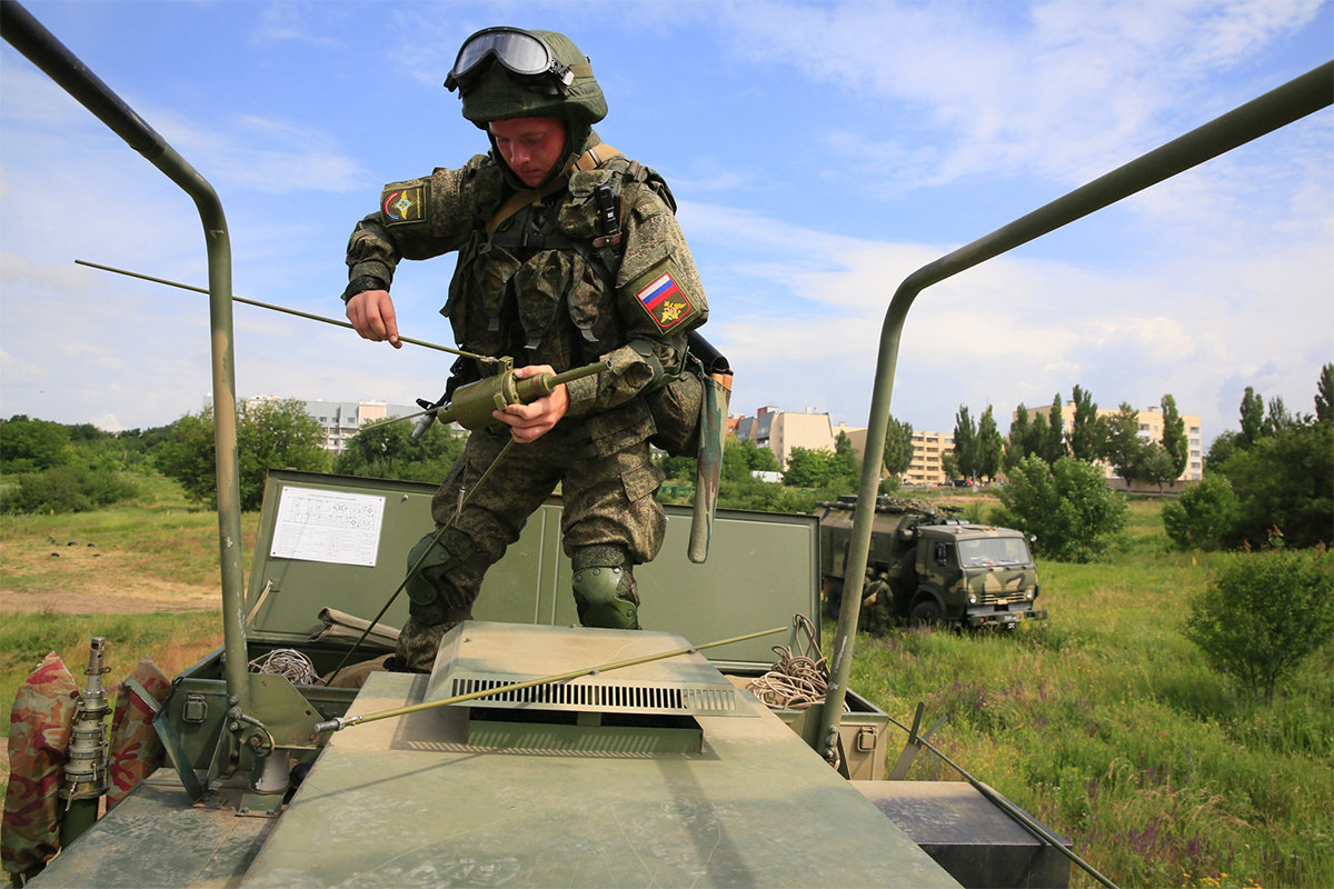 Тактико-специальное учение с подразделениями 176-й отдельной территориальной бригады управления Южного военного округа.